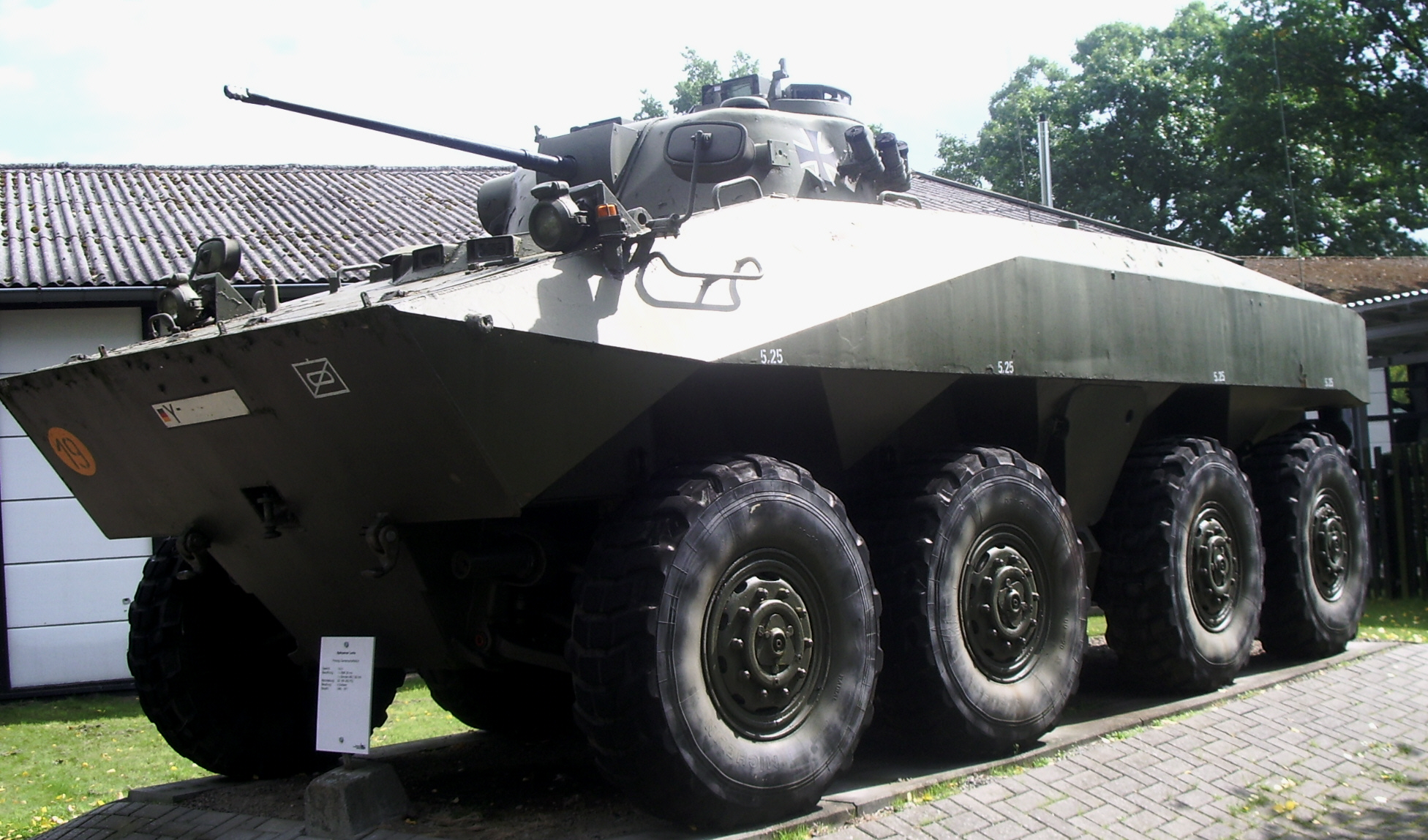 Spähpanzer Luchs (Prototyp/Vorserie) Besatzung: 4 Soldaten Gewicht: 19,6 t Motorleistung: 286 kW (390 PS) Bewaffnung: Bordmaschinenkanone 20 mm MK 20 Rh 202 und 2 MG 3 7,62 mm Stückzahl:408